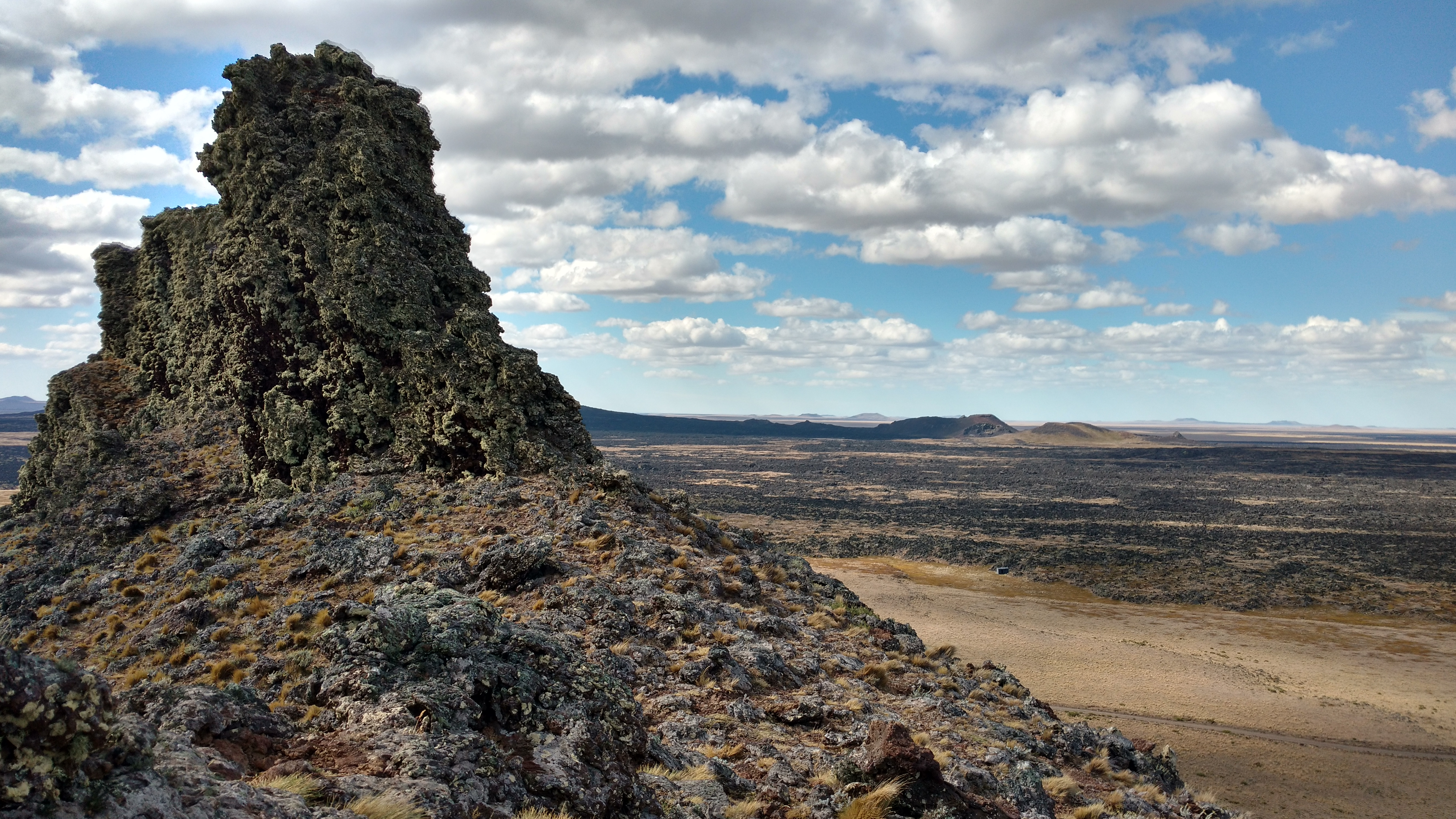 Parque Nacional Pali Aike, Región de Magallanes y Antártica Chilena, Chile